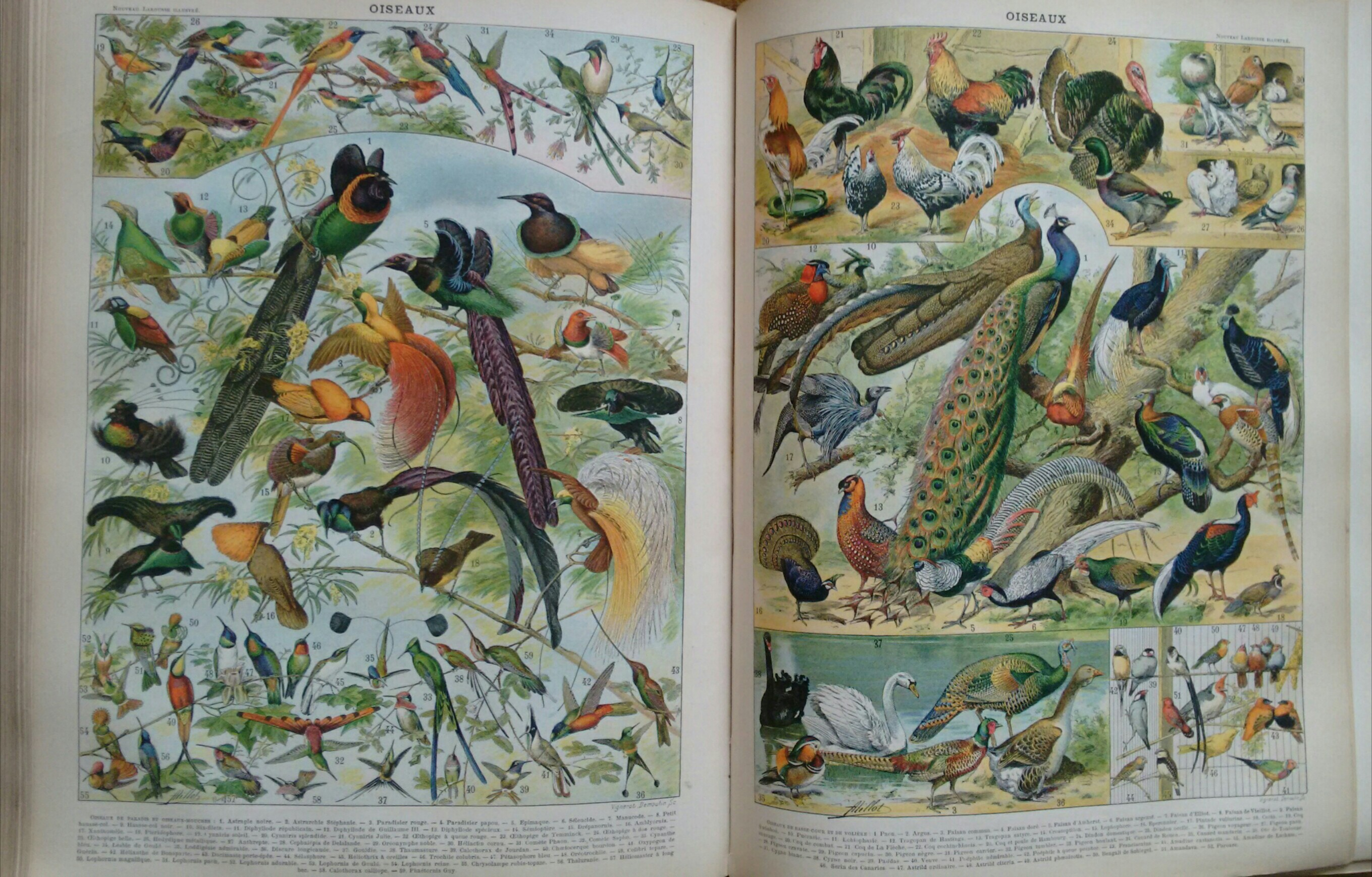 Nouveau Larousse illustré - Claude Augé - planche oiseaux